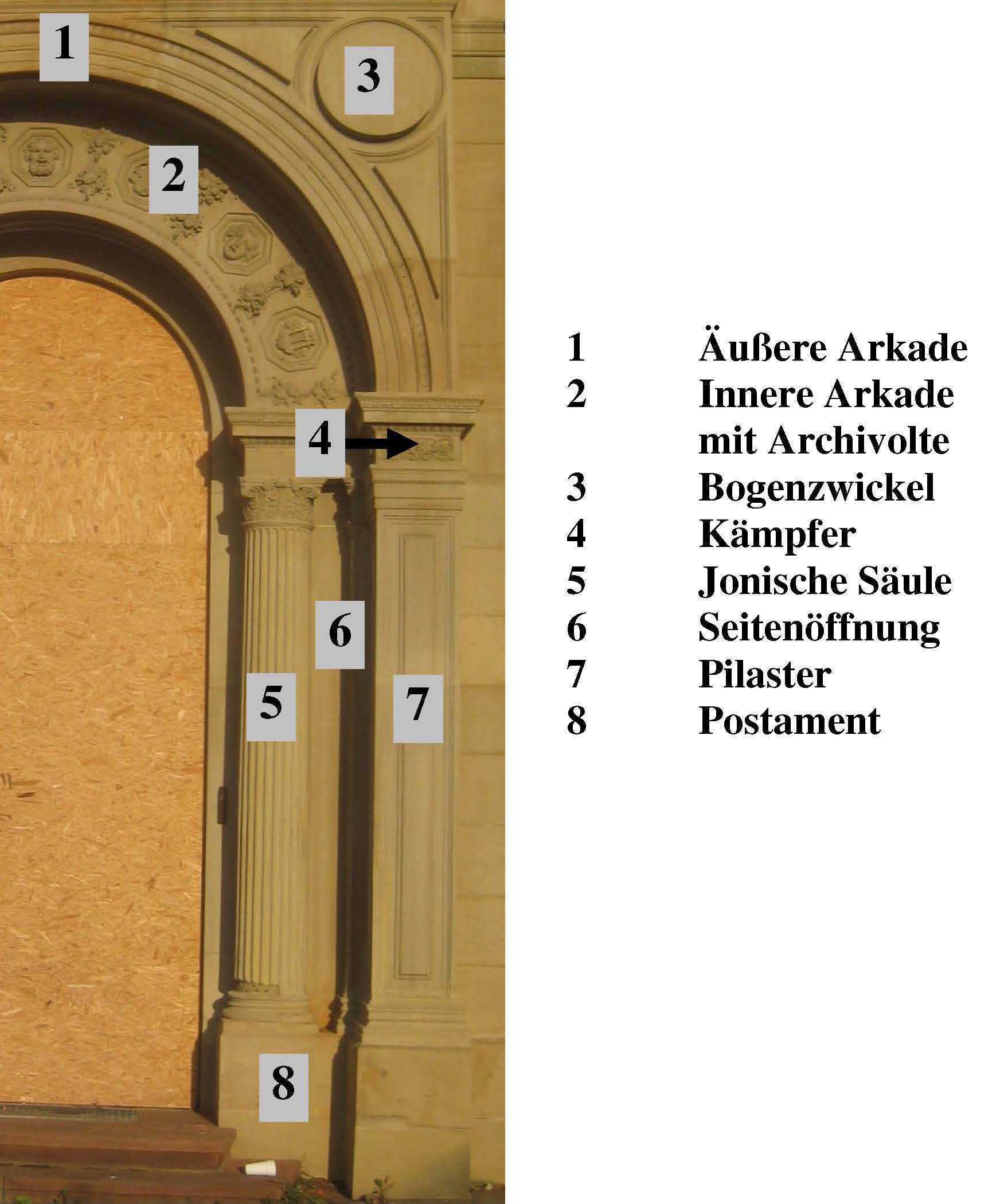 Stuttgart, Villa Berg, Westfassade, Seitenportal, Bauteilplan.